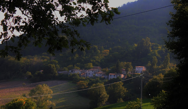 Vista panoramica del paese